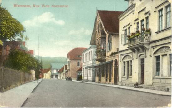 1920, Rua XV de Novembro, Blumenáu/SC